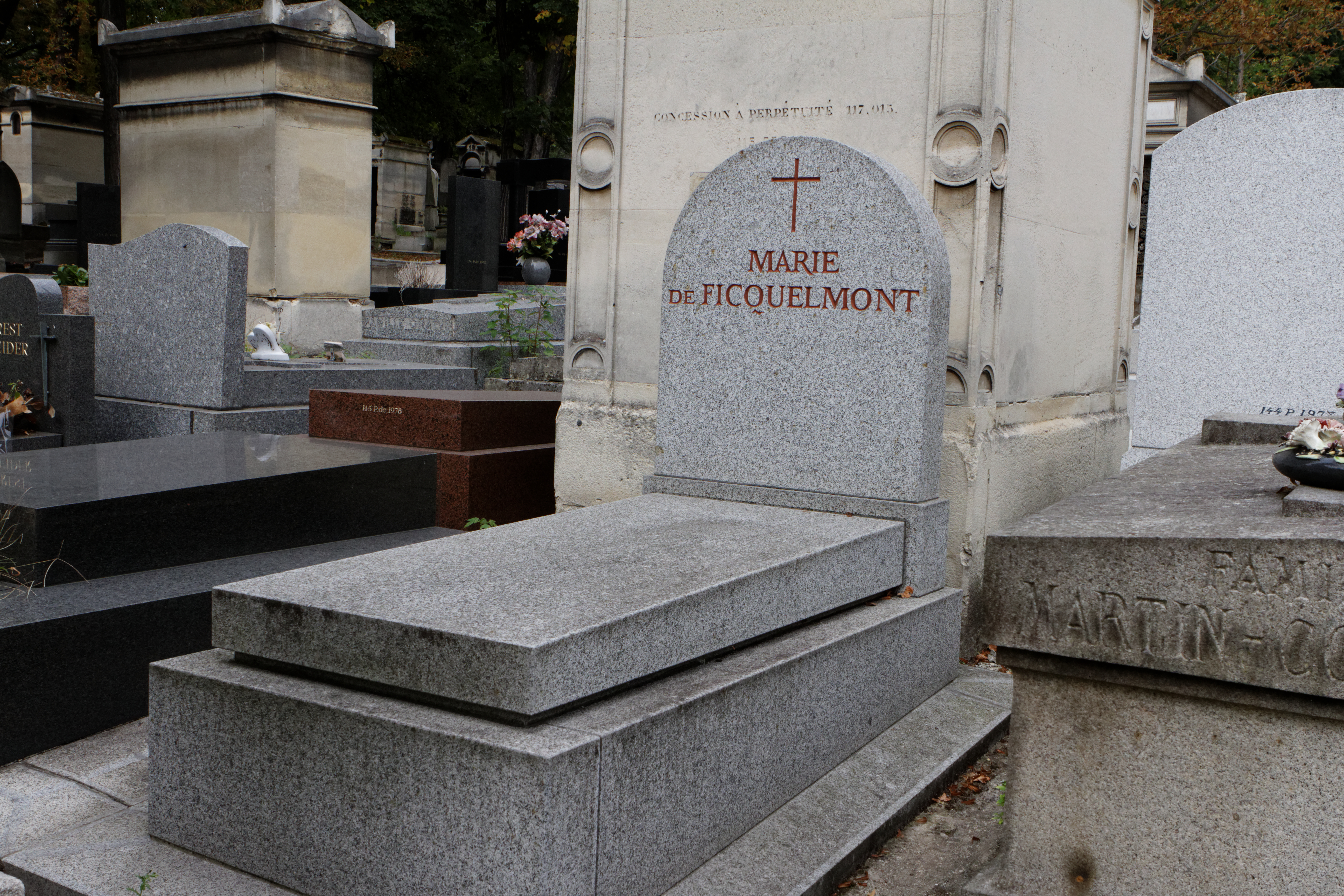 Sépulture de Clotilde de Vaux, née de Ficquelmont (1815-1846). Elle inspira à Auguste Comte la « Religion de l'Humanité ».